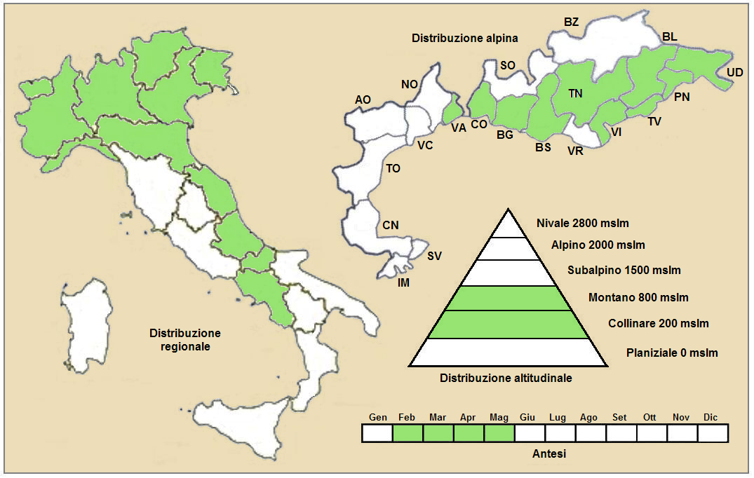 Helleborus niger – Distribuzione